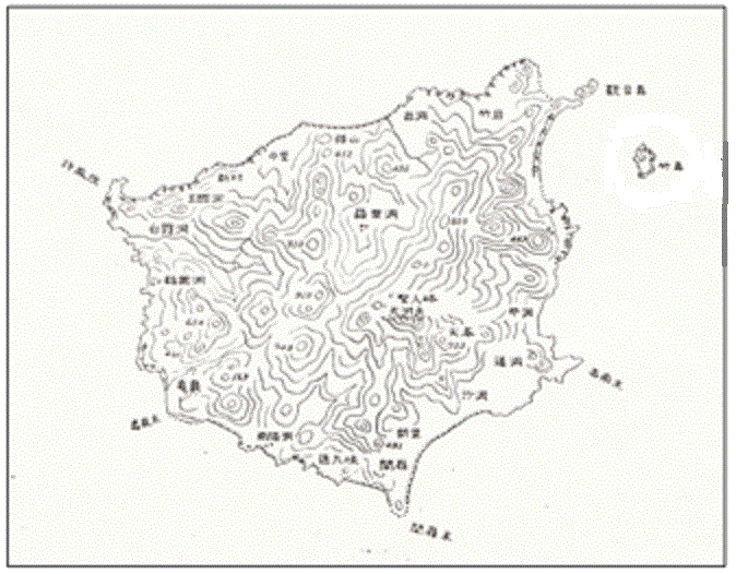 鬱陵島とその付属島嶼（竹嶼・観音島）